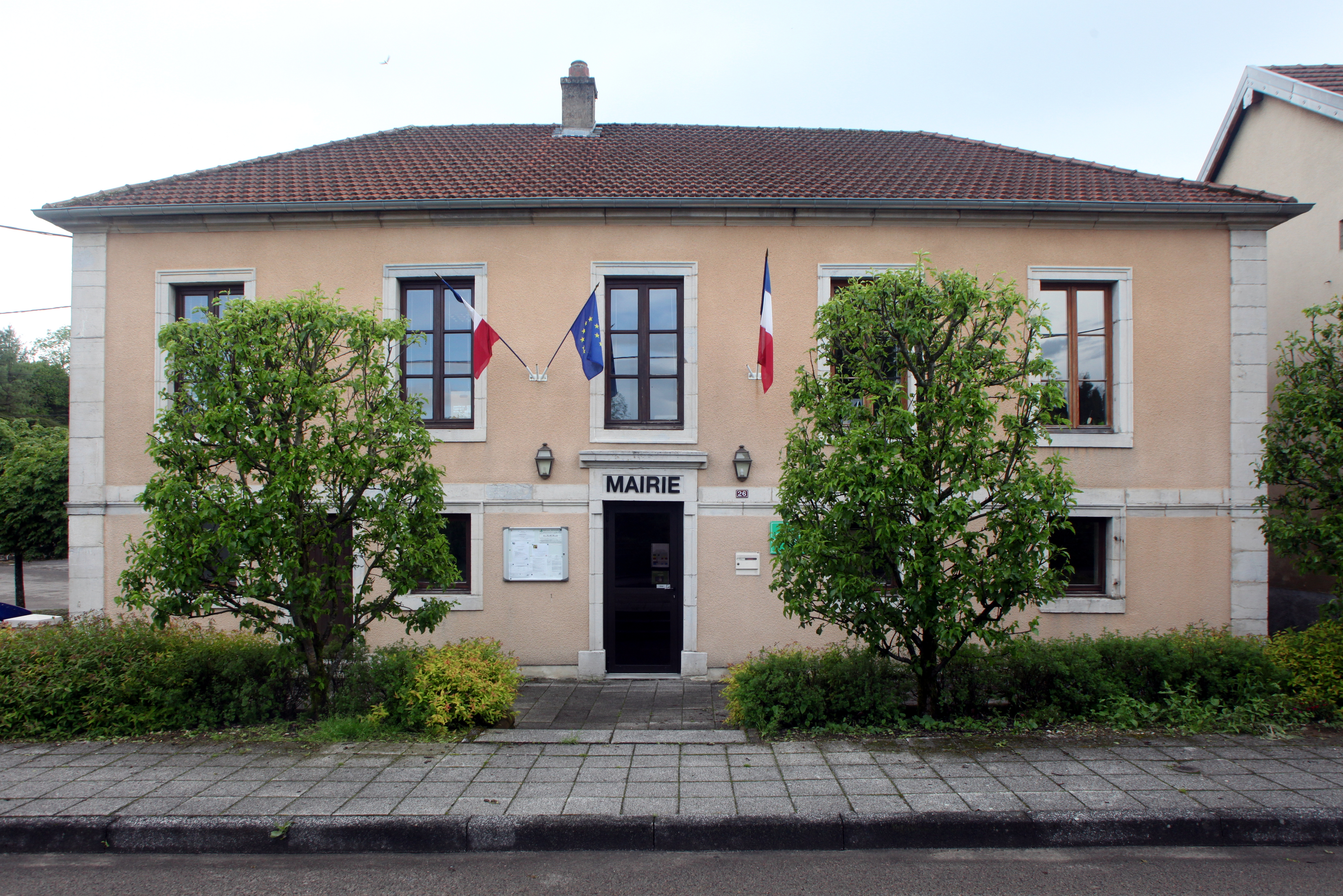 Mairie de Nods (Doubs).